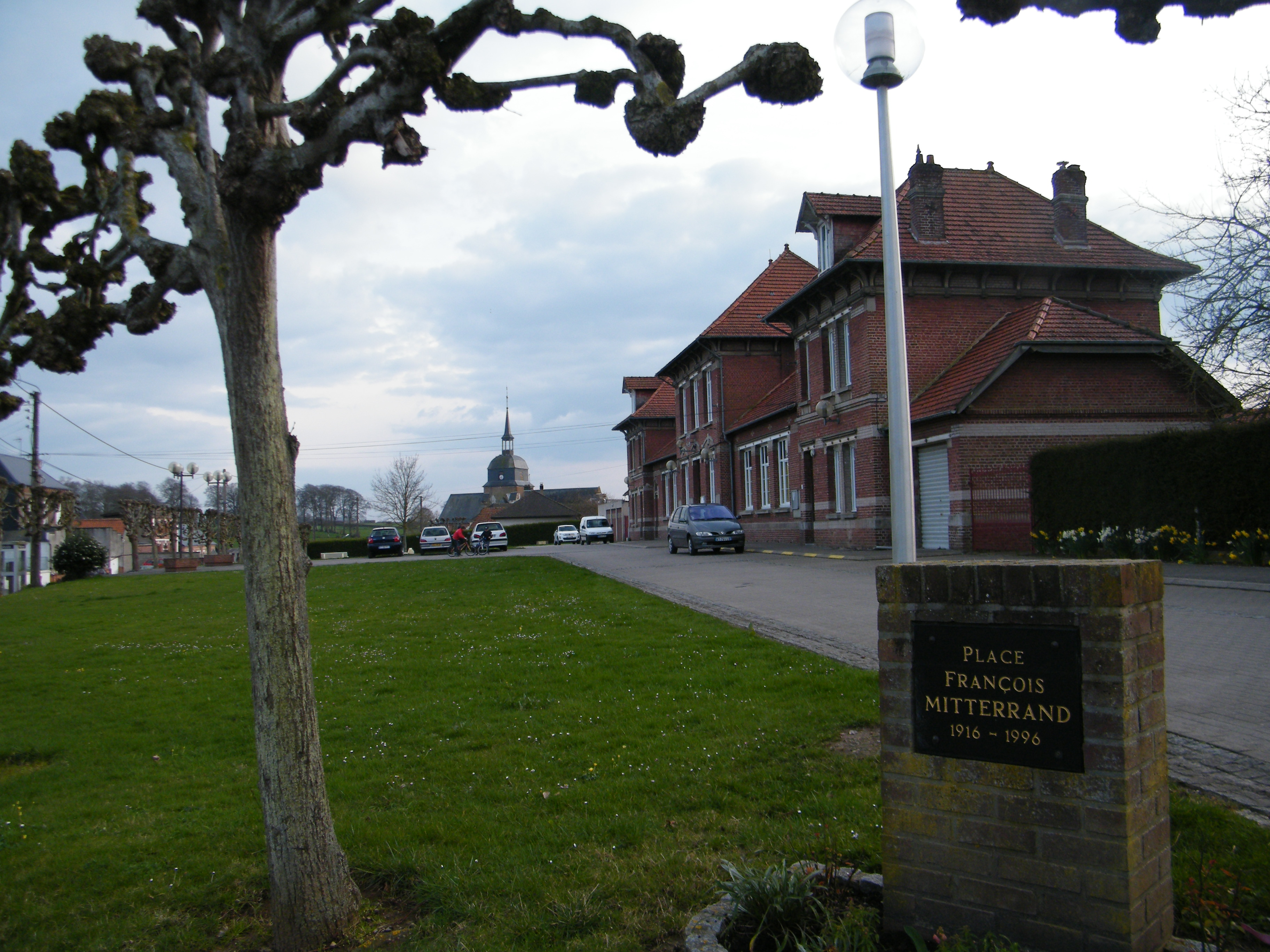 La place du village : école et mairie.